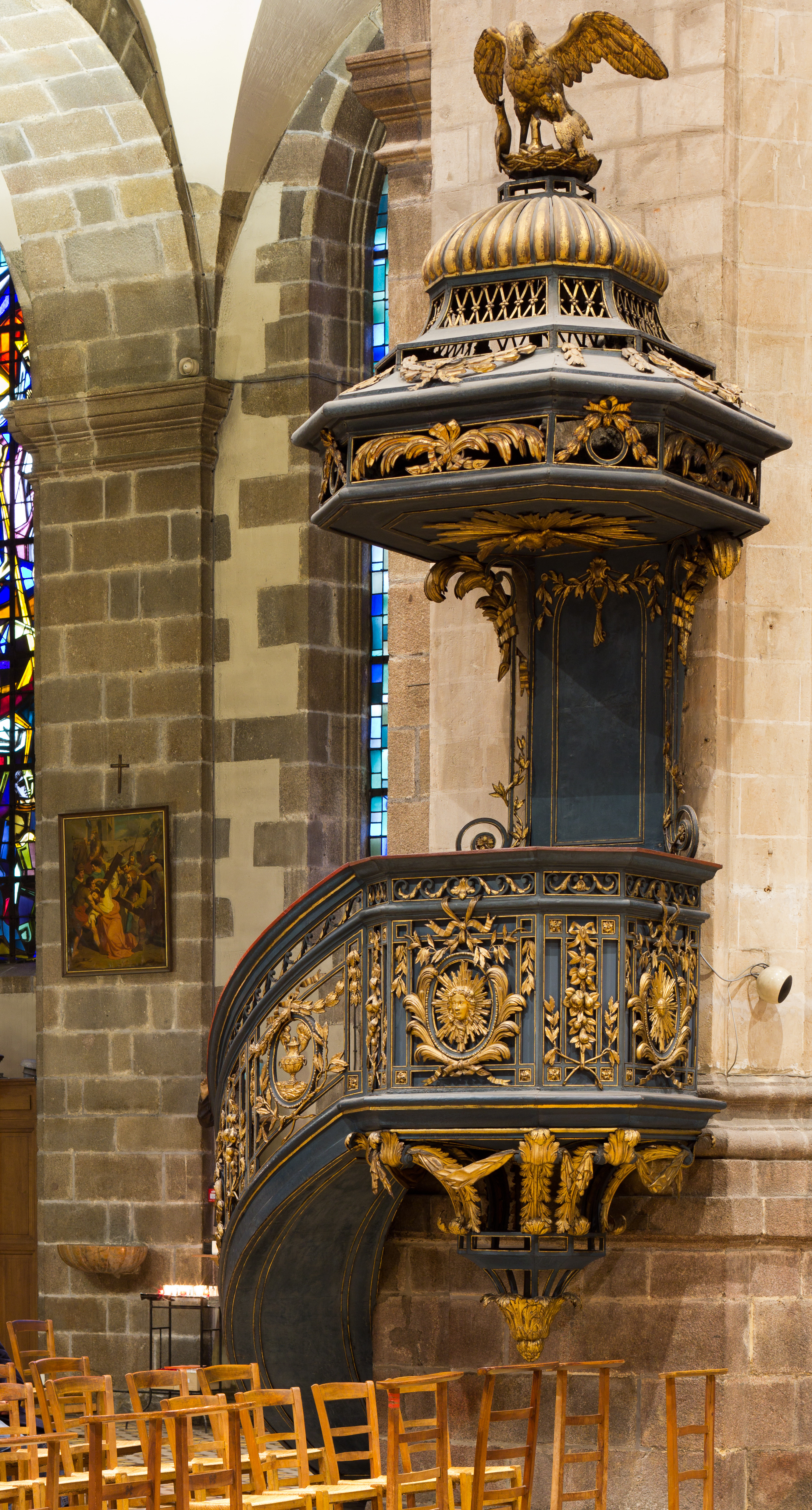 Ferronnerie de Jean Guibert sur les plans d'Albéric Graapensberger (1781).